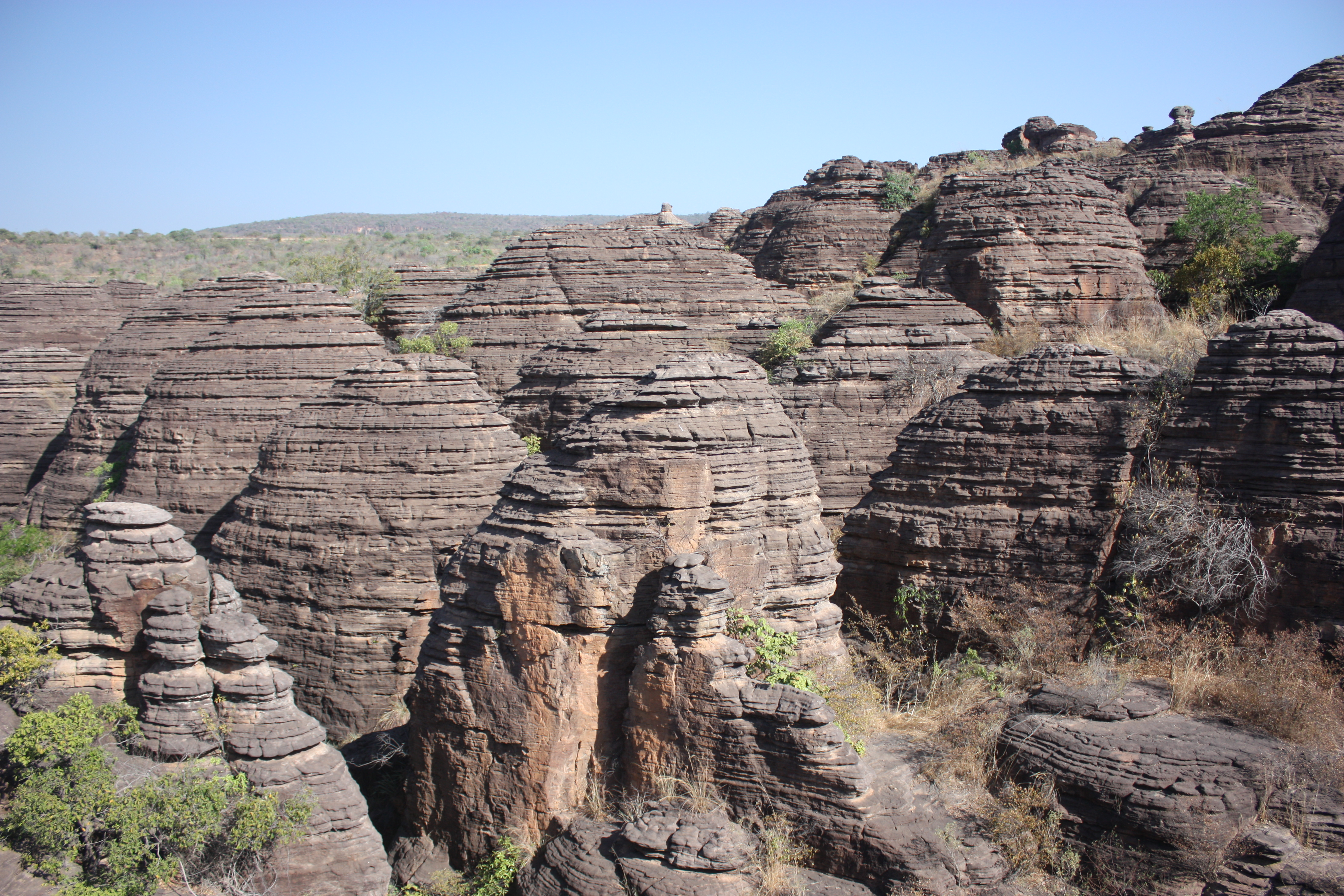 Domes de Fabedougou, near Banfora, Burkina Faso